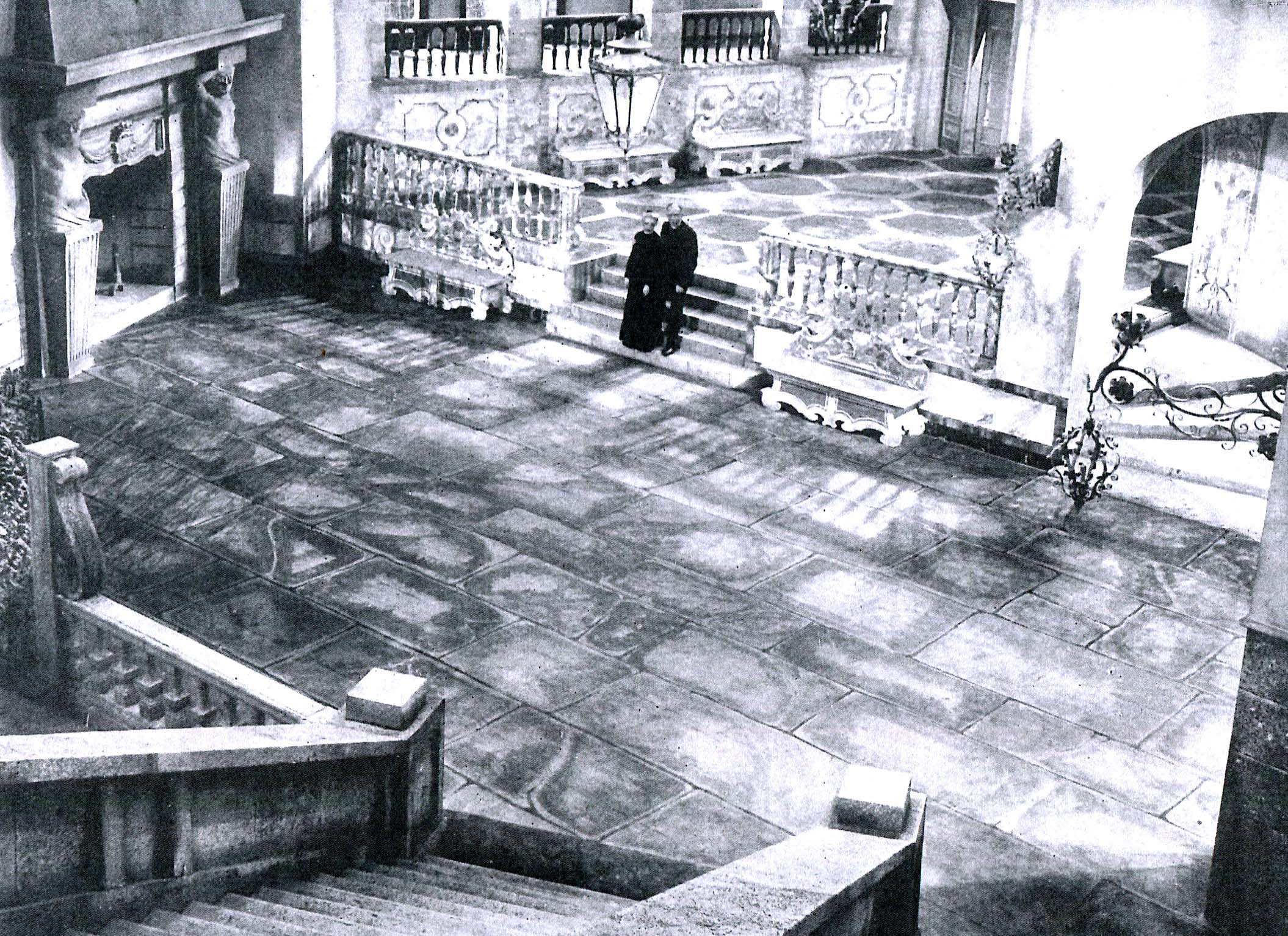 Terra di nessuno (Baffico, 1939) - foto scena